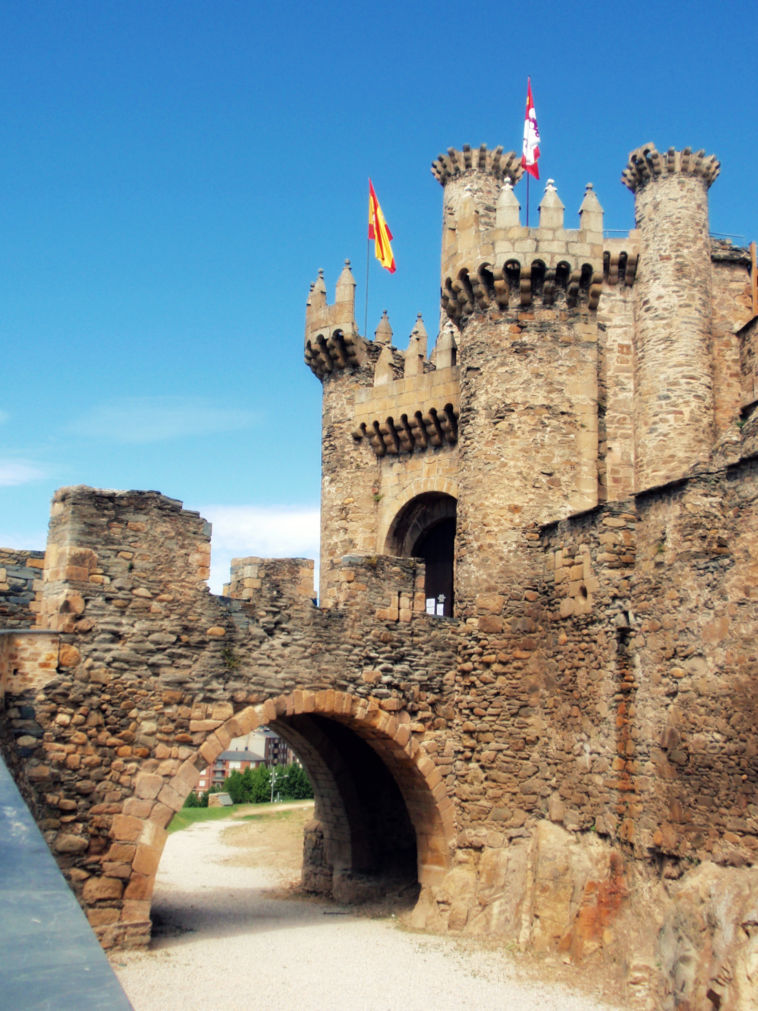 Castillo de Ponferrada.